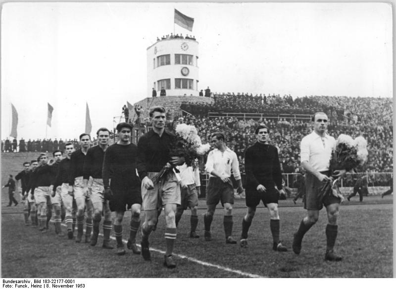 Zentralbild-Funck 9.11.1953 Fußball-Elf Torpedo Moskau gegen Berliner Stadtauswahl. Am 8.11.53 erlebten 60 000 fussballbegeisterte Berliner im Walter-Ulbricht-Stadion das letzte Gastspiel der sowjetischen Fussball-Elf Torpedo Moskau in der Deutschen Demokratischen Republik. Das Spiel der Torpedo-Mannschaft gegen die Auswahl des Demokratischen Sektors von Berlin endete mit 1:1 Unentschieden. UBz. Stürmisch begrüsst von den Zuschauern betreten die Mannschaften das Spielfeld. (Links) Torpedo Moskau, angeführt von Kapitän Archipow und (rechts) die Berliner Stadtauswahl mit dem Meister des Sports Scherbaum an der Spitze.